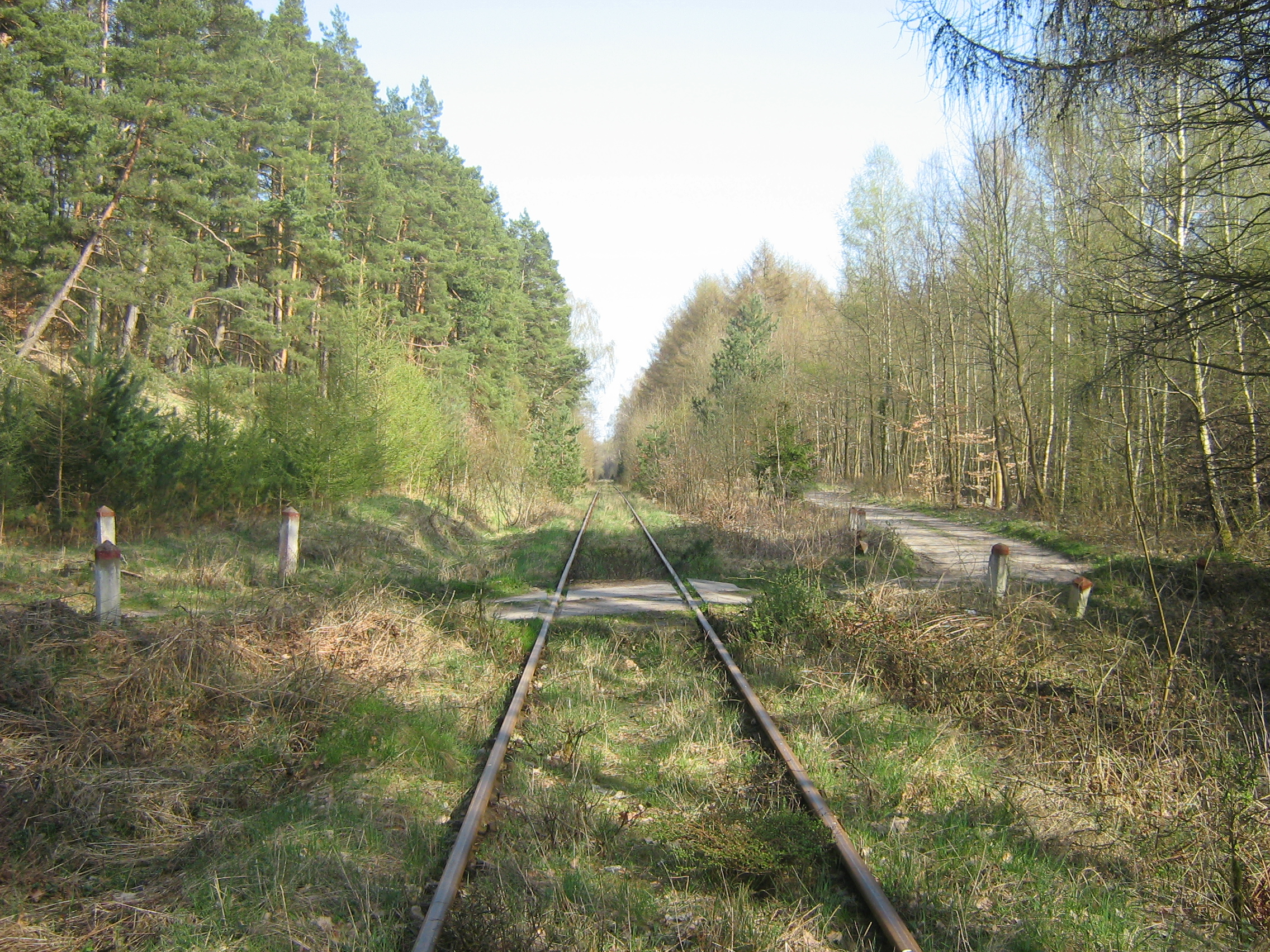 Linia kolejowa Worowo - Wysoka Kamieńska, między stacją Golczewo Pomorskie a Barnisławice